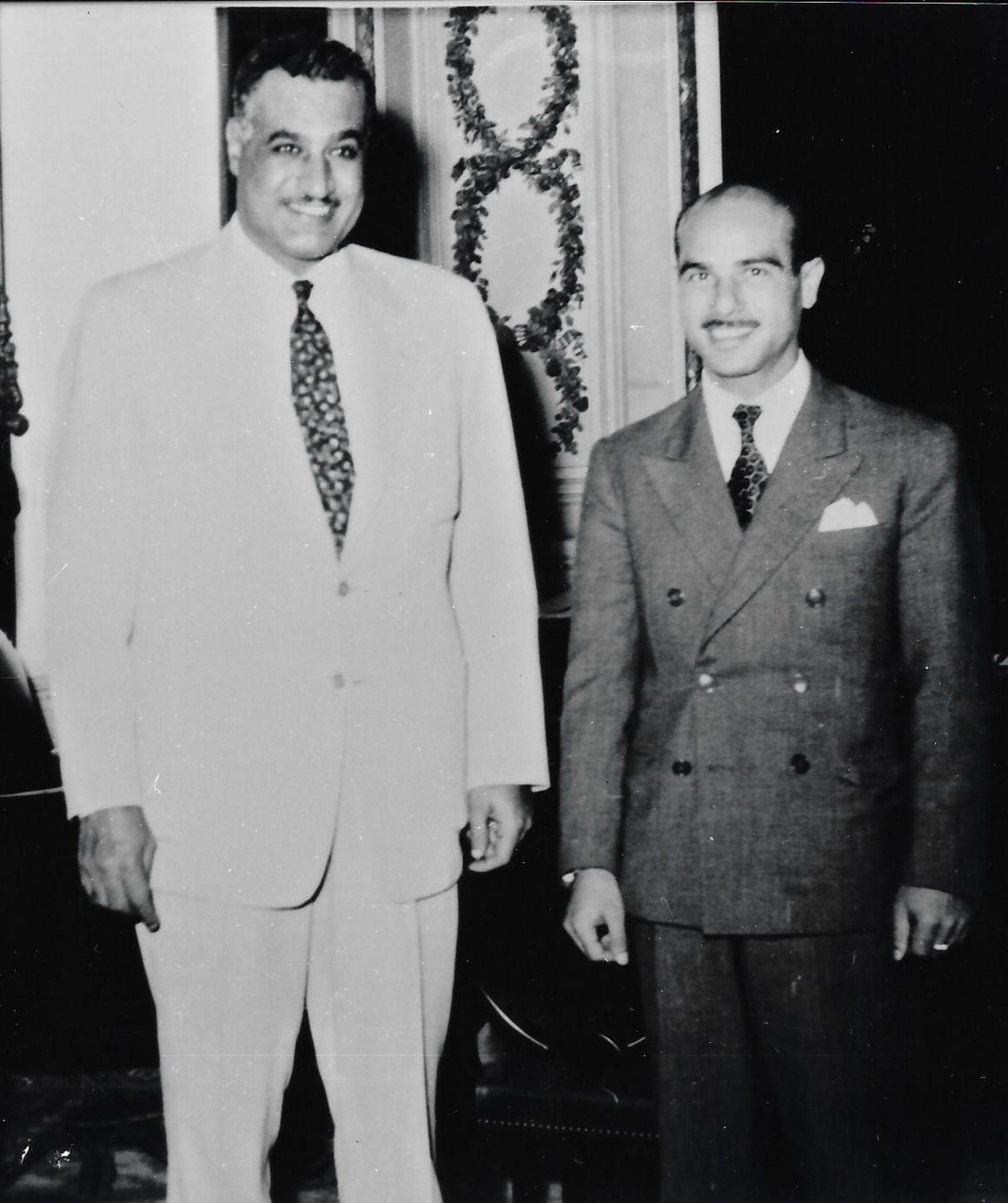 בצילום משותף עם נשיא מצרים